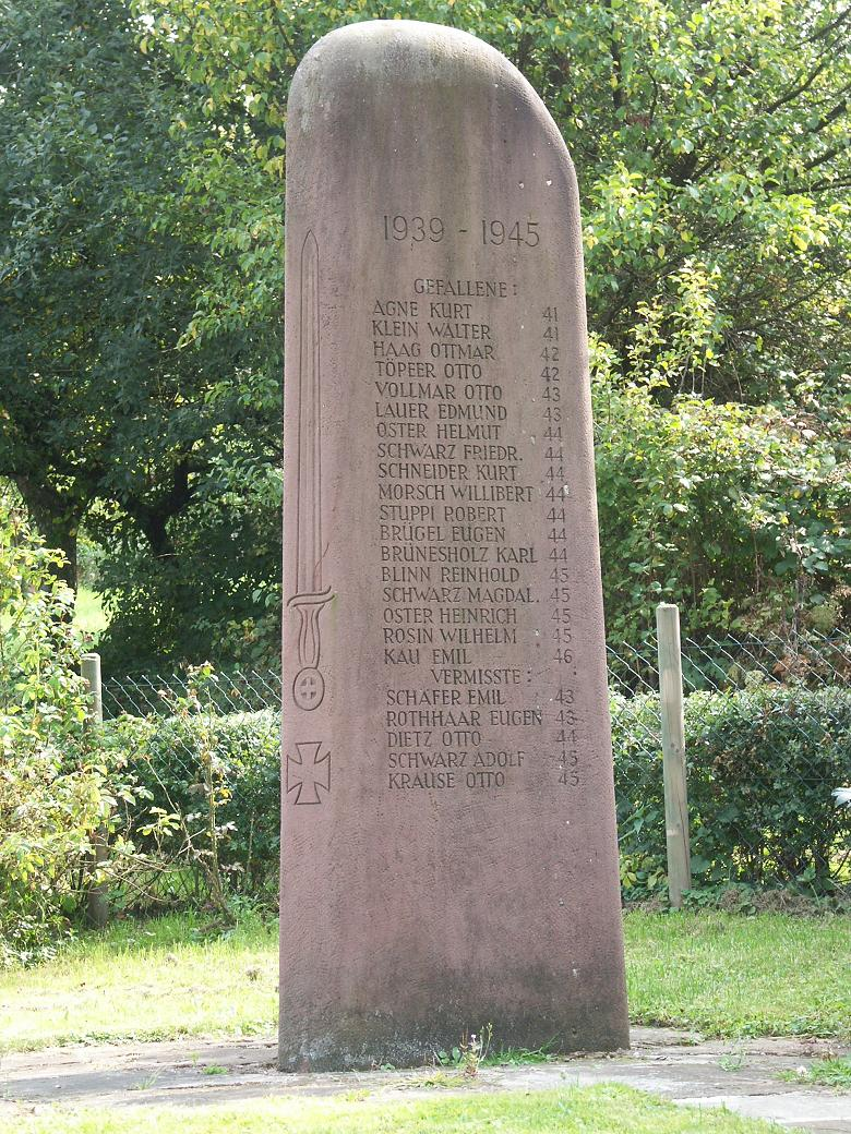 War Memorial - Krieger-/Kriegsopferdenkmal - Mémorial de guerre